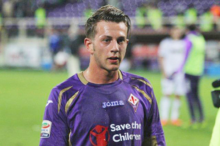 Federico Bernardeschi (Carrara, 16 febbraio 1994) è un calciatore italiano, attaccante della Fiorentina, e della Nazionale Under-21 italiana. (from it.wp)